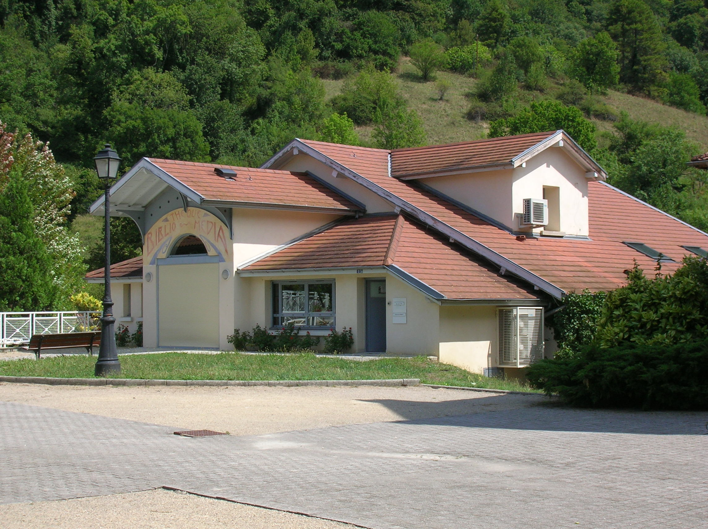 Fontanil-Cornillon, Isère, AuRA, France.